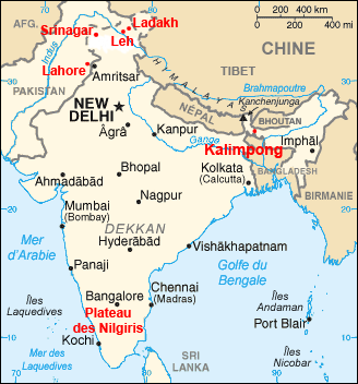 Régions et villes où le prince Pierre et son épouse ont séjourné durant leurs deux expéditions anthropologiques.